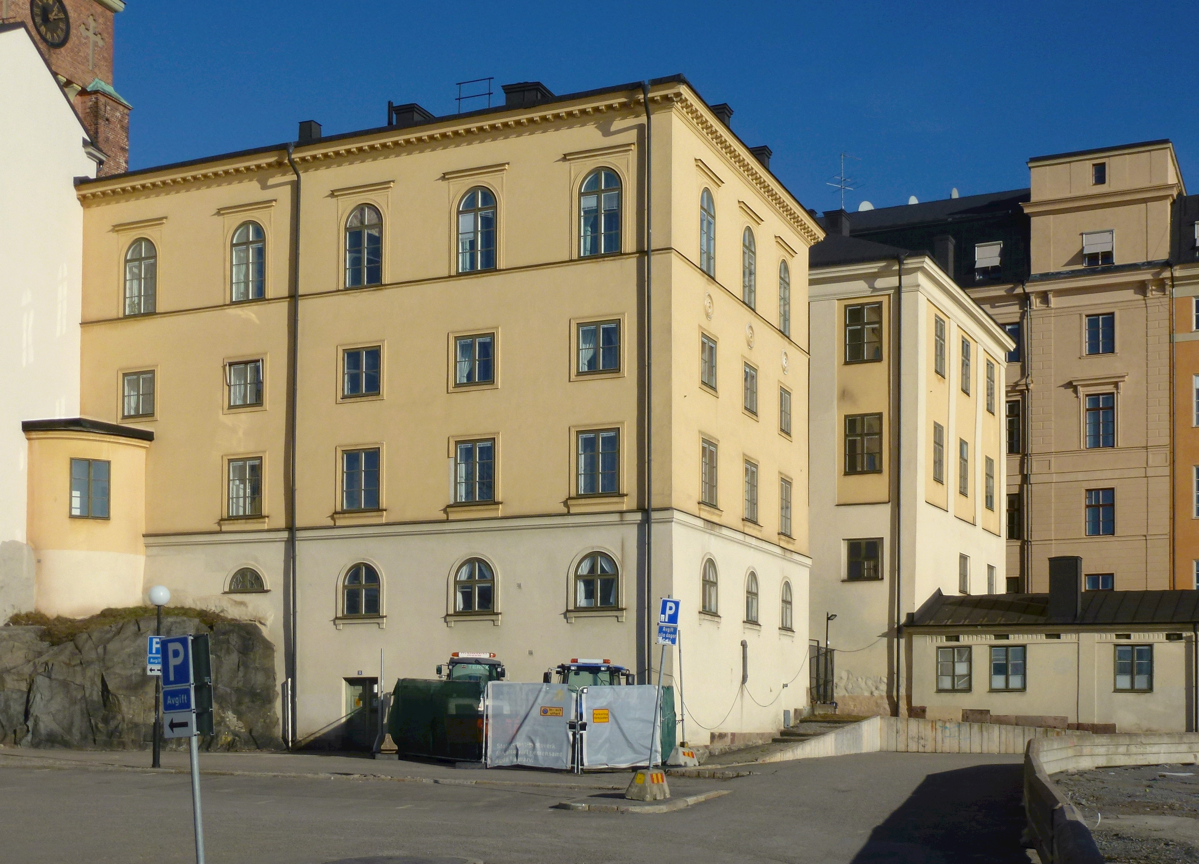 Gymnasiehusen på Riddarholmen